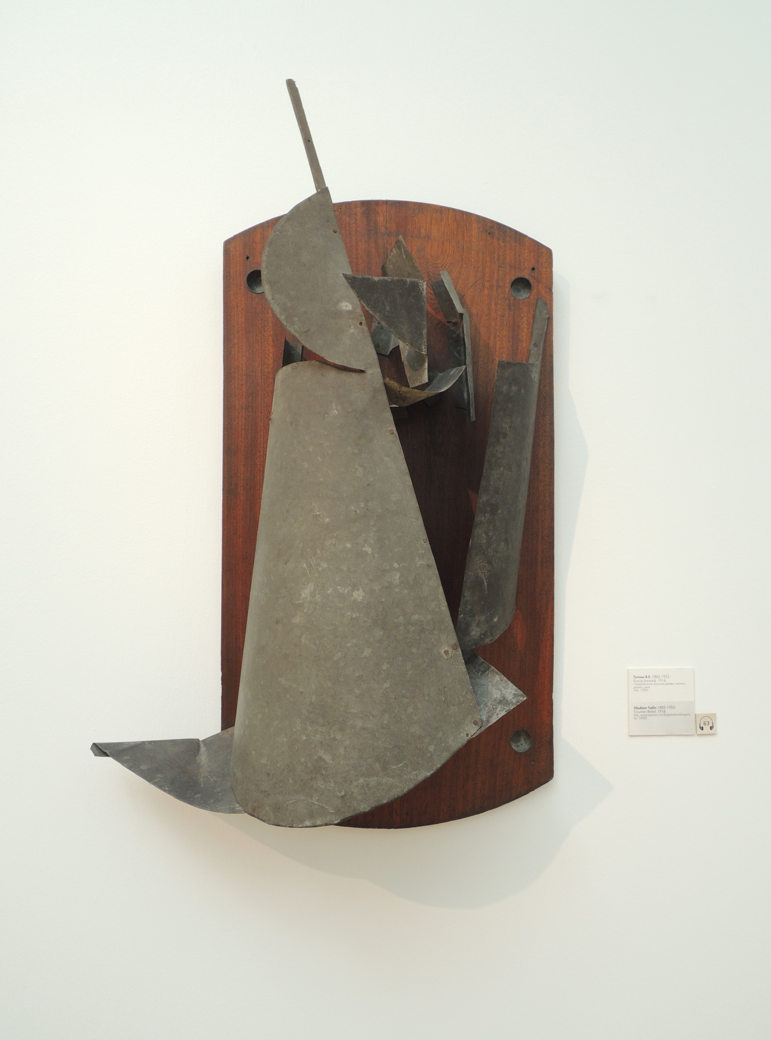 Владимир Татлин (1885-1953). Контр-рельеф, 1916. Лакированное красное дерево, железо, дерево, цинк. ГТГ. Инв. 10982.